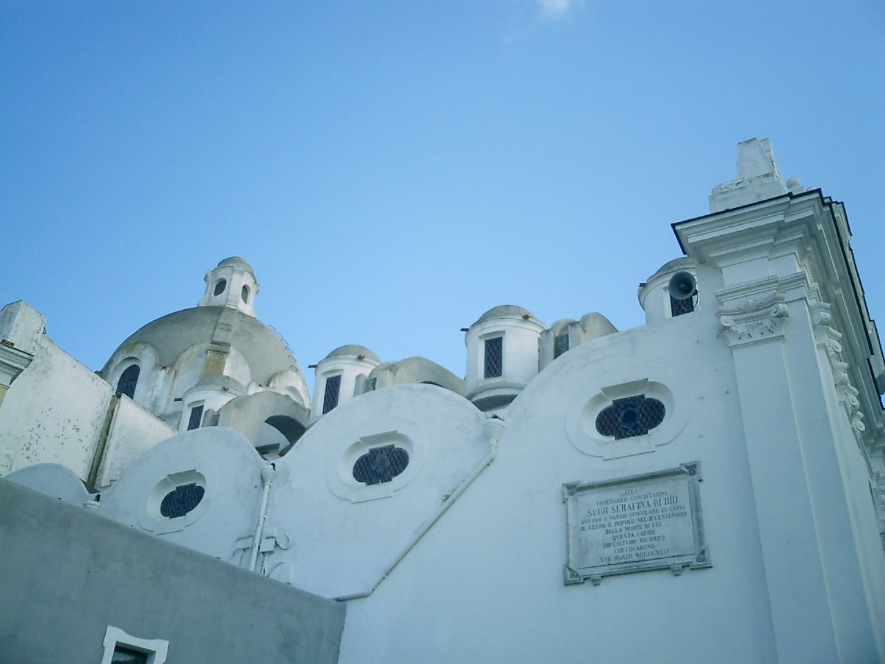 Capri, Campania, Italia, Chiesa di Santo Stefano